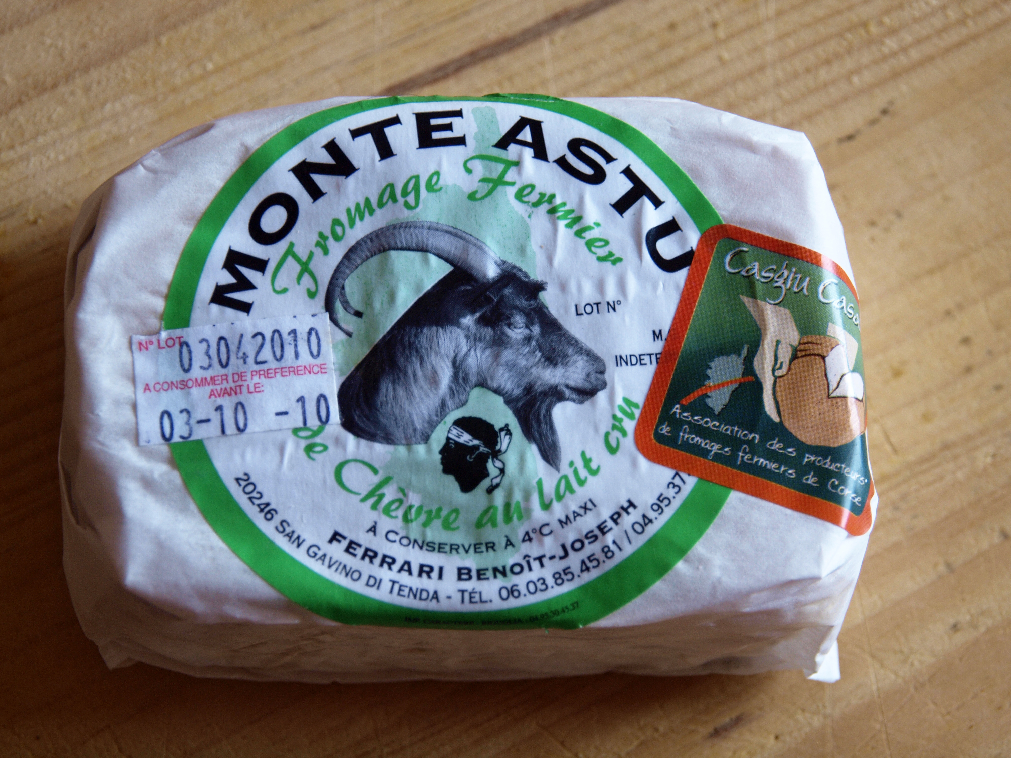 Monte Astu, fromage fermier au lait de chèvre cru (Corsica)